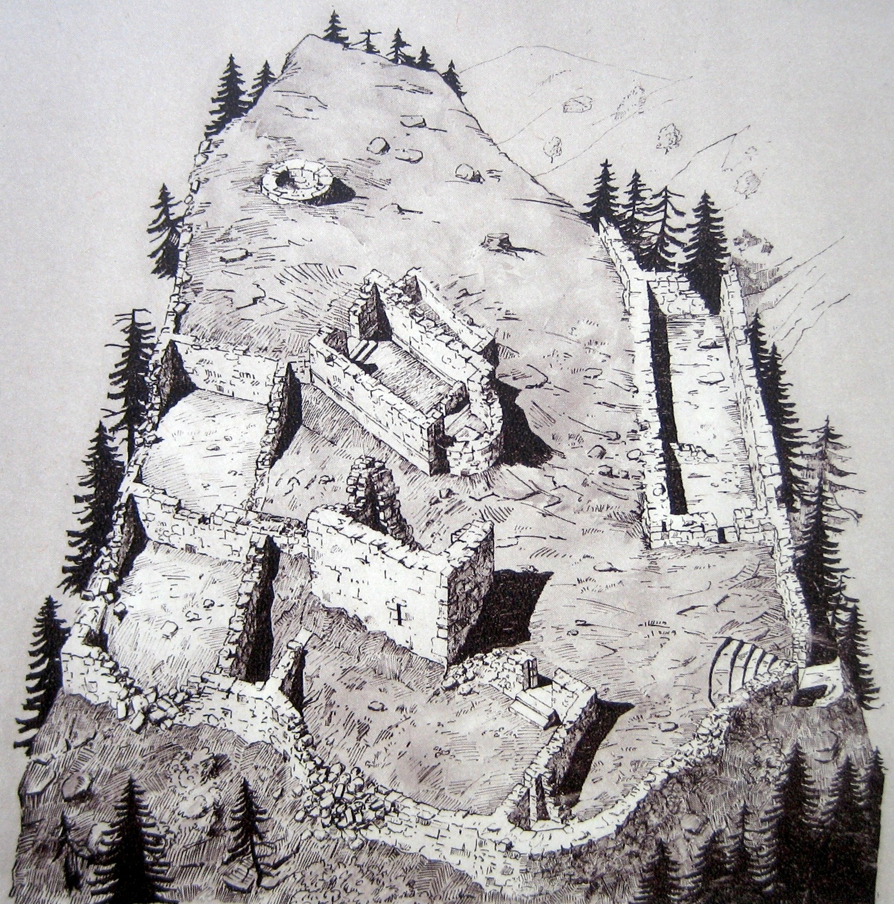 Ruine von Sogn Parcazi auf einer Zeichnung von 1936